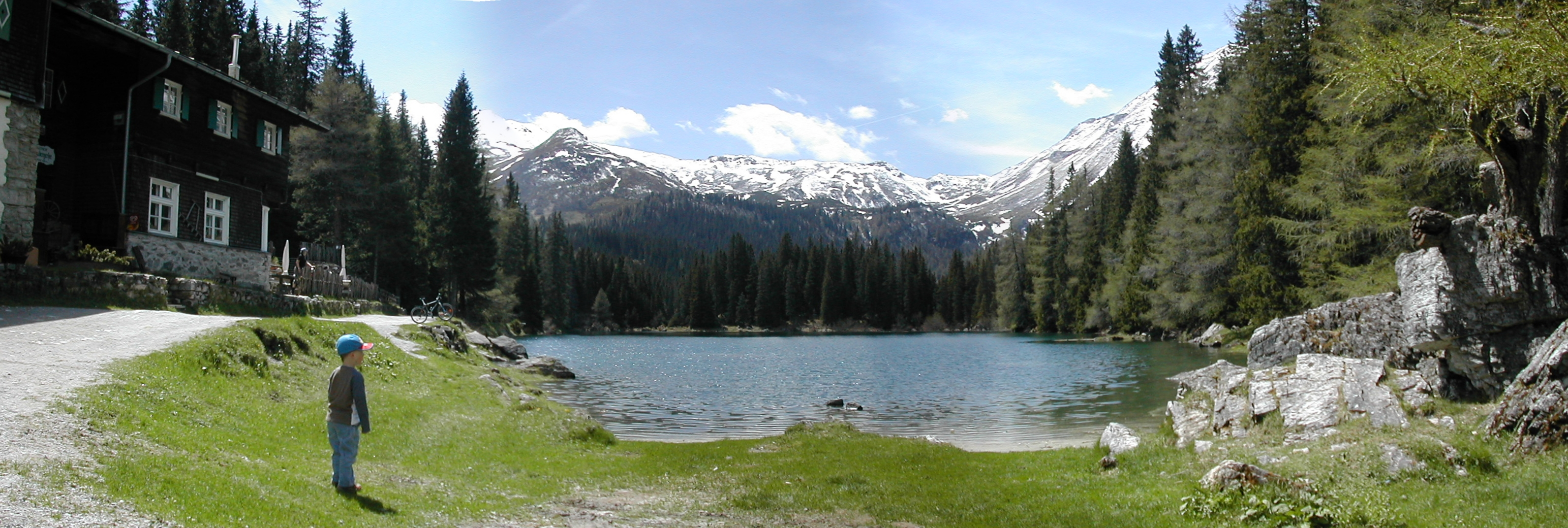 Obernbergersee